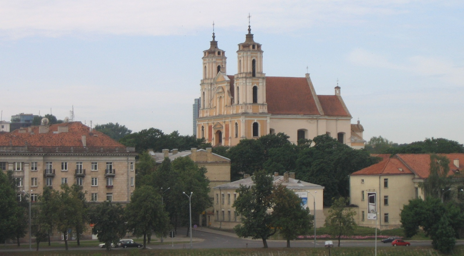 Autoriaus nuotrauka. 2006.07.29. Vilniaus Šv. apaštalų Pilypo ir Jokūbo bažnyčia